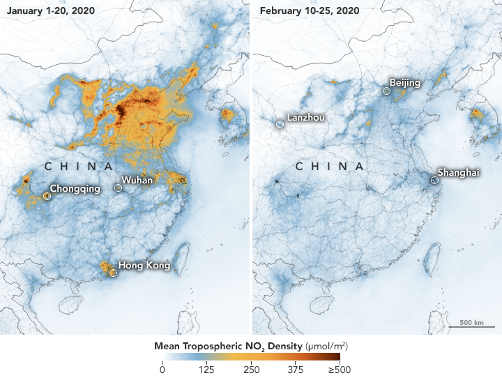 Decreases in nitrogen dioxide (NO2) over China